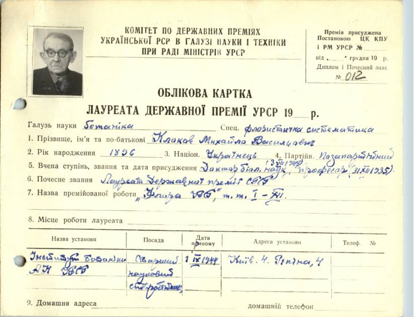 Mykhailo Klokov